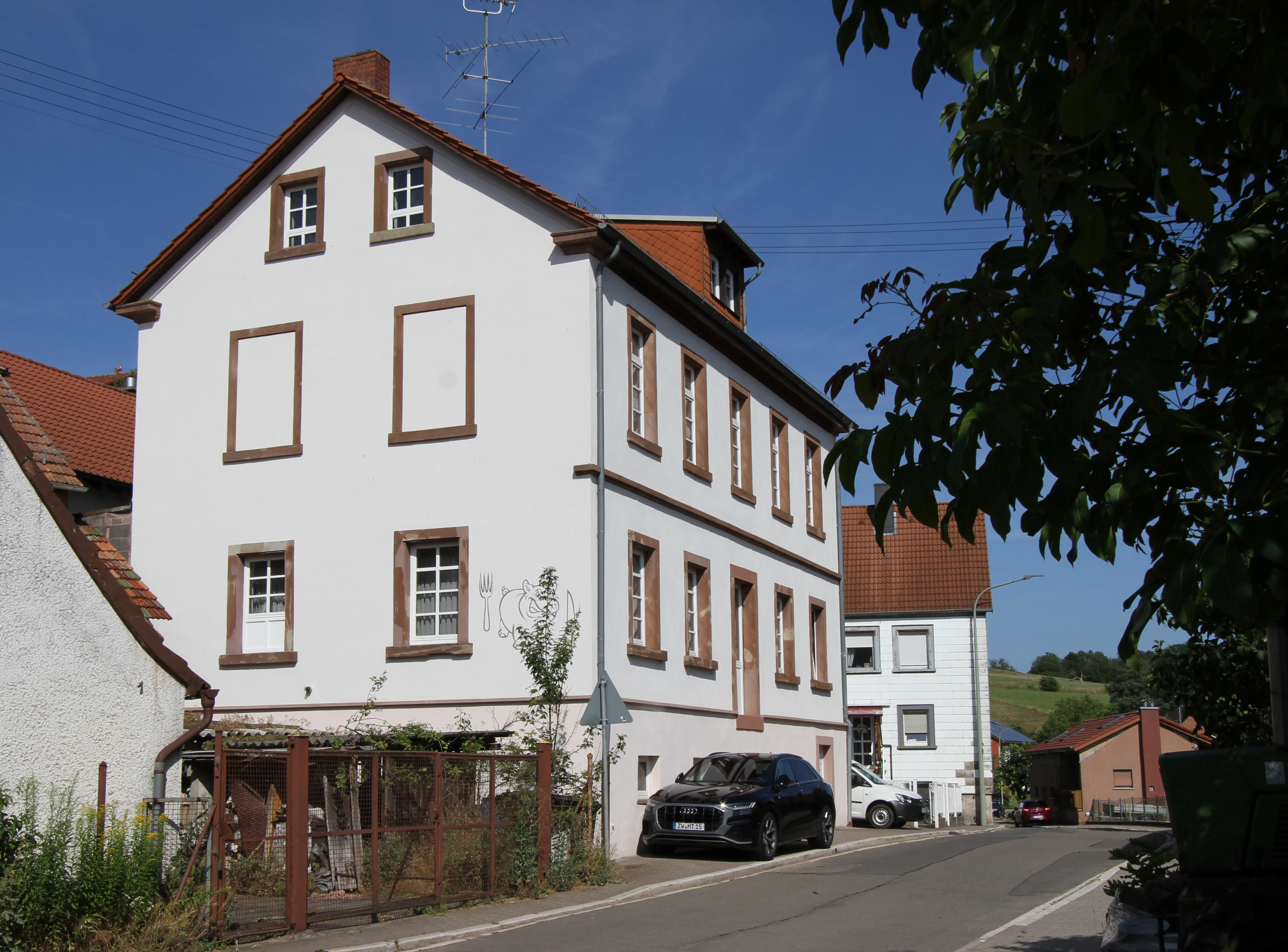 Walshausen